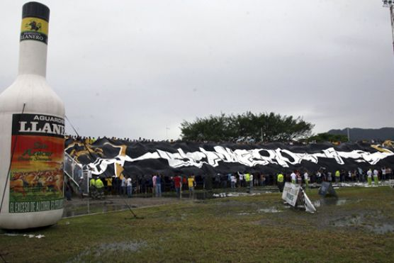 aficionados